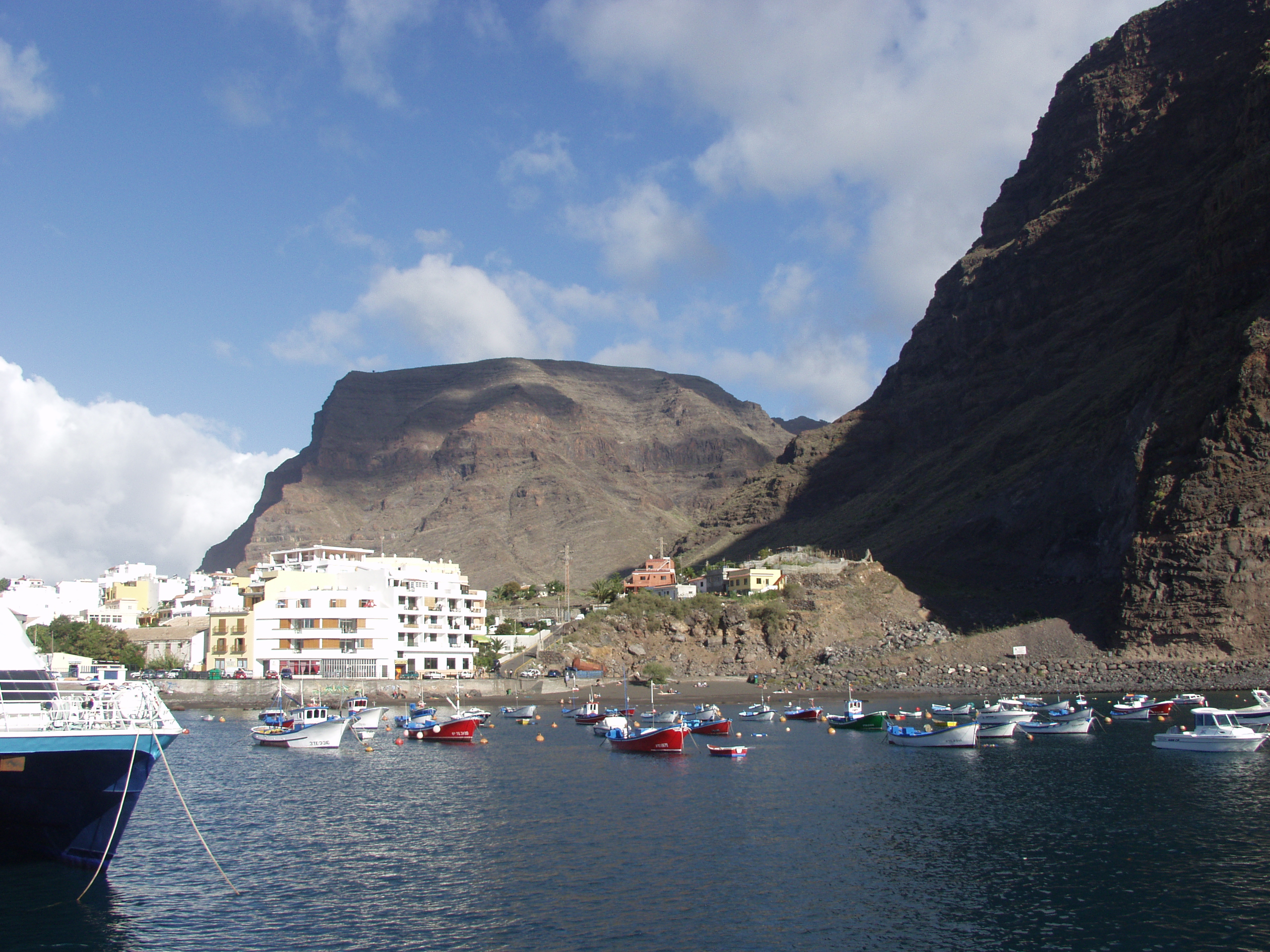 Blick in das Hafenbecken von Vueltas, Valle Gran Rey, La Gomera, Spanien